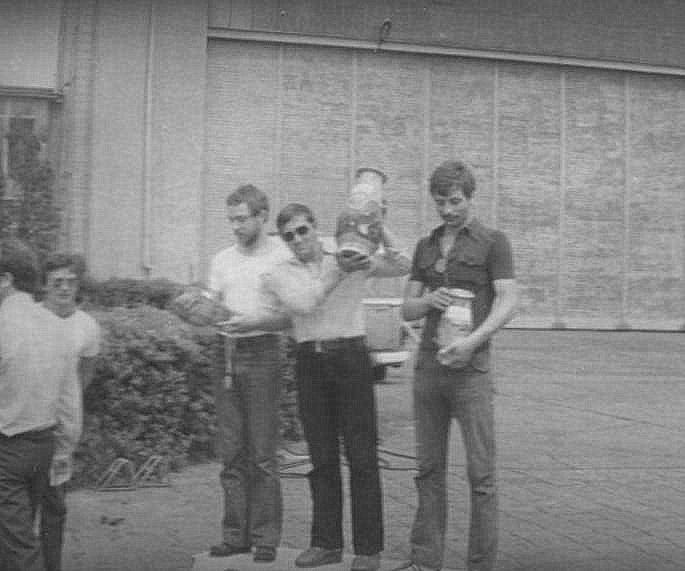 VII Międzynarodowe Klubowe Zawody Spadochronowe Gliwice 1983. Zwycięzcy w konkurencji celności indywidualnie: 1. Łuszczki Roman (Bielsko-Biała), 2. Filus Krzysztof (Katowice), 3. Zang Joachim (Lubeka)